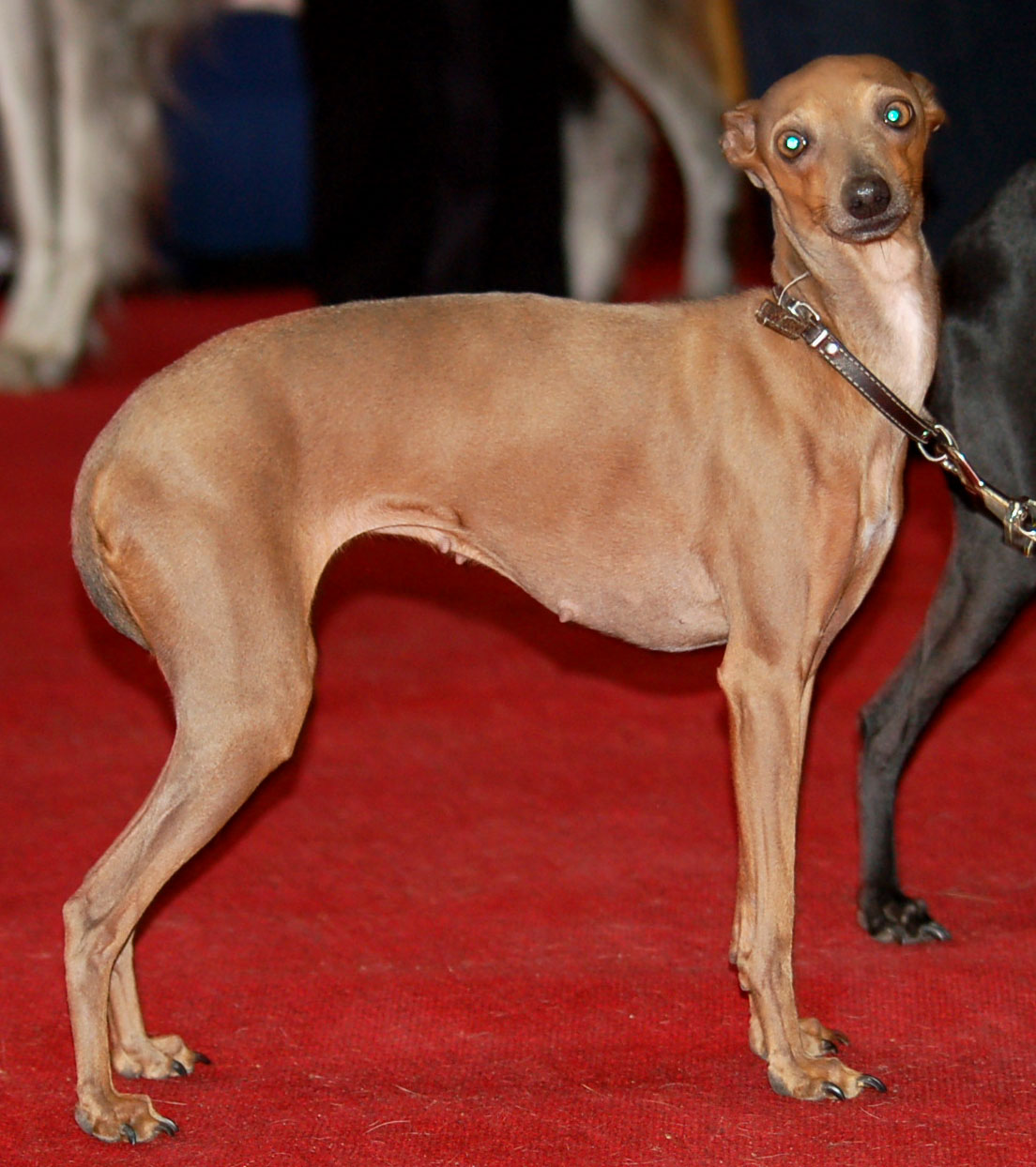 Charcik_włoski